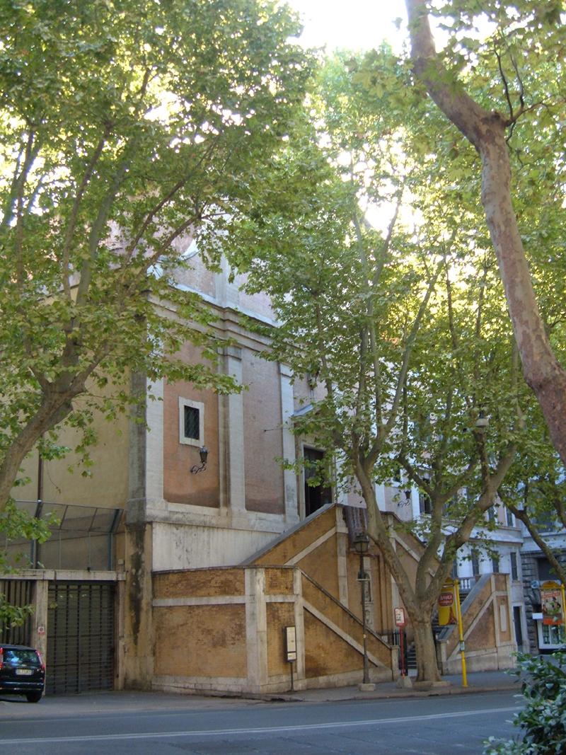 Chiesa di Santa Maria Immacolata a Via Veneto, nel rione Ludovisi, a Roma.